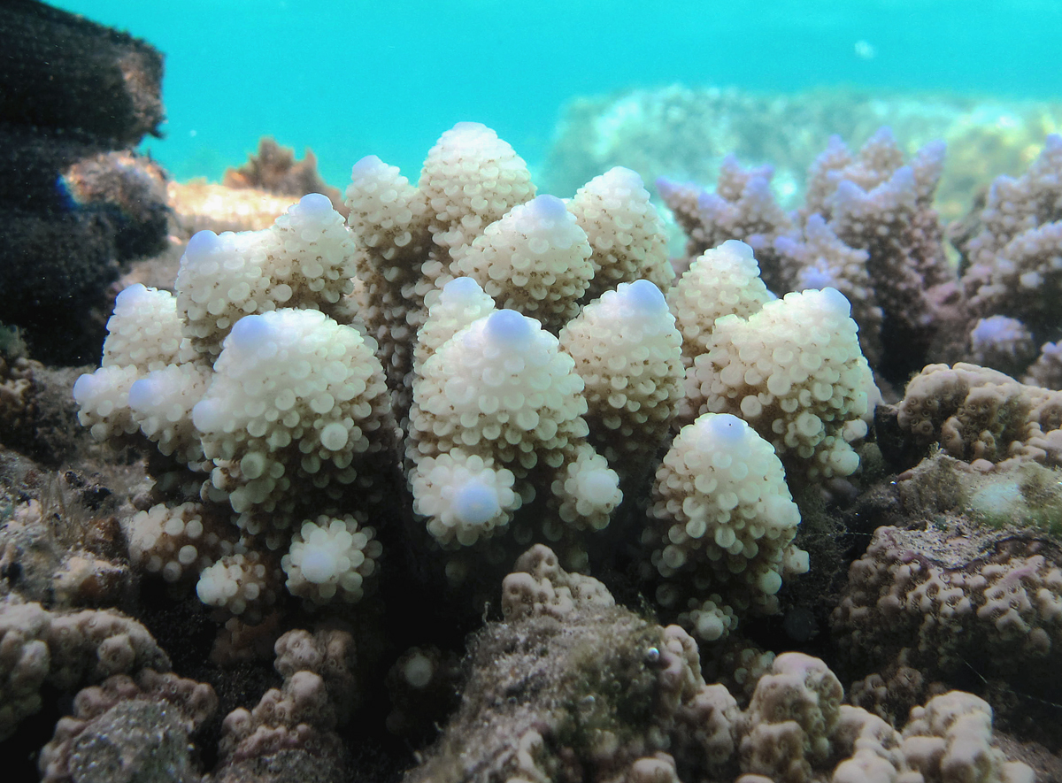 Une colonie de corail (Acropora sp.) à la Réunion.